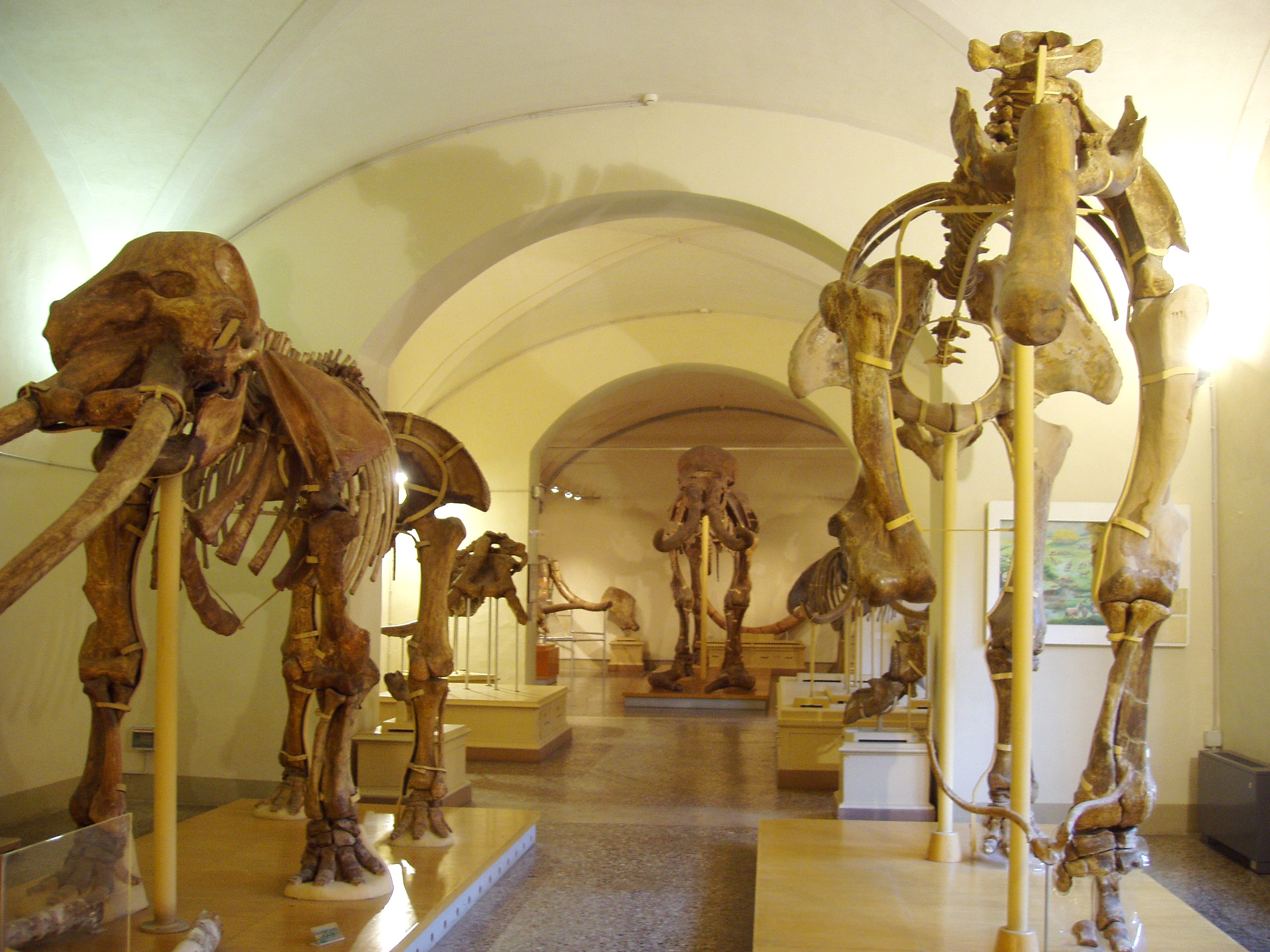 Museo di Storia Naturale di Firenze, Sezione di Geologia e Paleontologia, Florence, Italy. Fossil skeletons of early elephants.